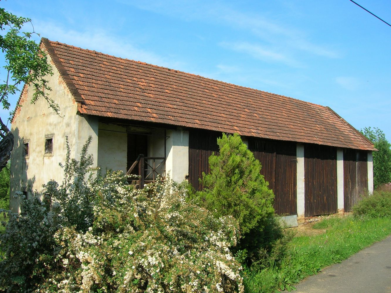 Jellegzetes csűr Velemér Fő utcájában. A bokor mögött látható az épület elülső részén egy élelmiszer tárolására szolgáló, a talajszinthez képes megemelt kamra